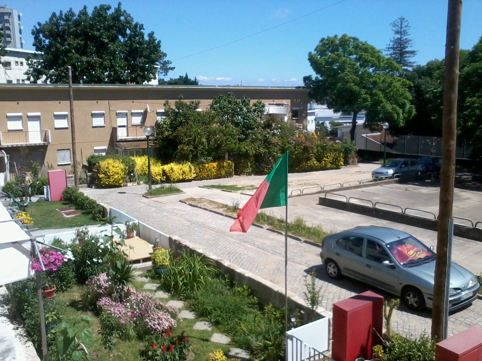 Foto do Bairro Rainha D. Leonor, em Junho de 2012